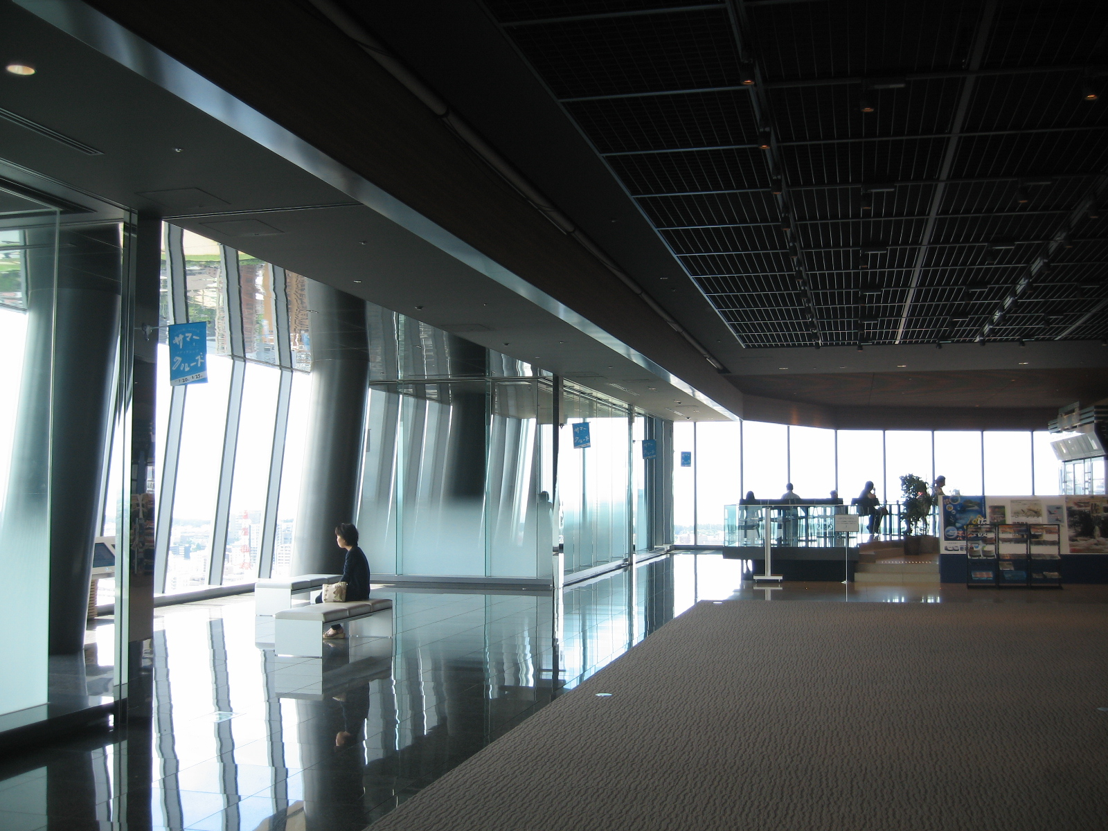 新潟市中央区。新潟日報メディアシップ20階の展望ラウンジ。